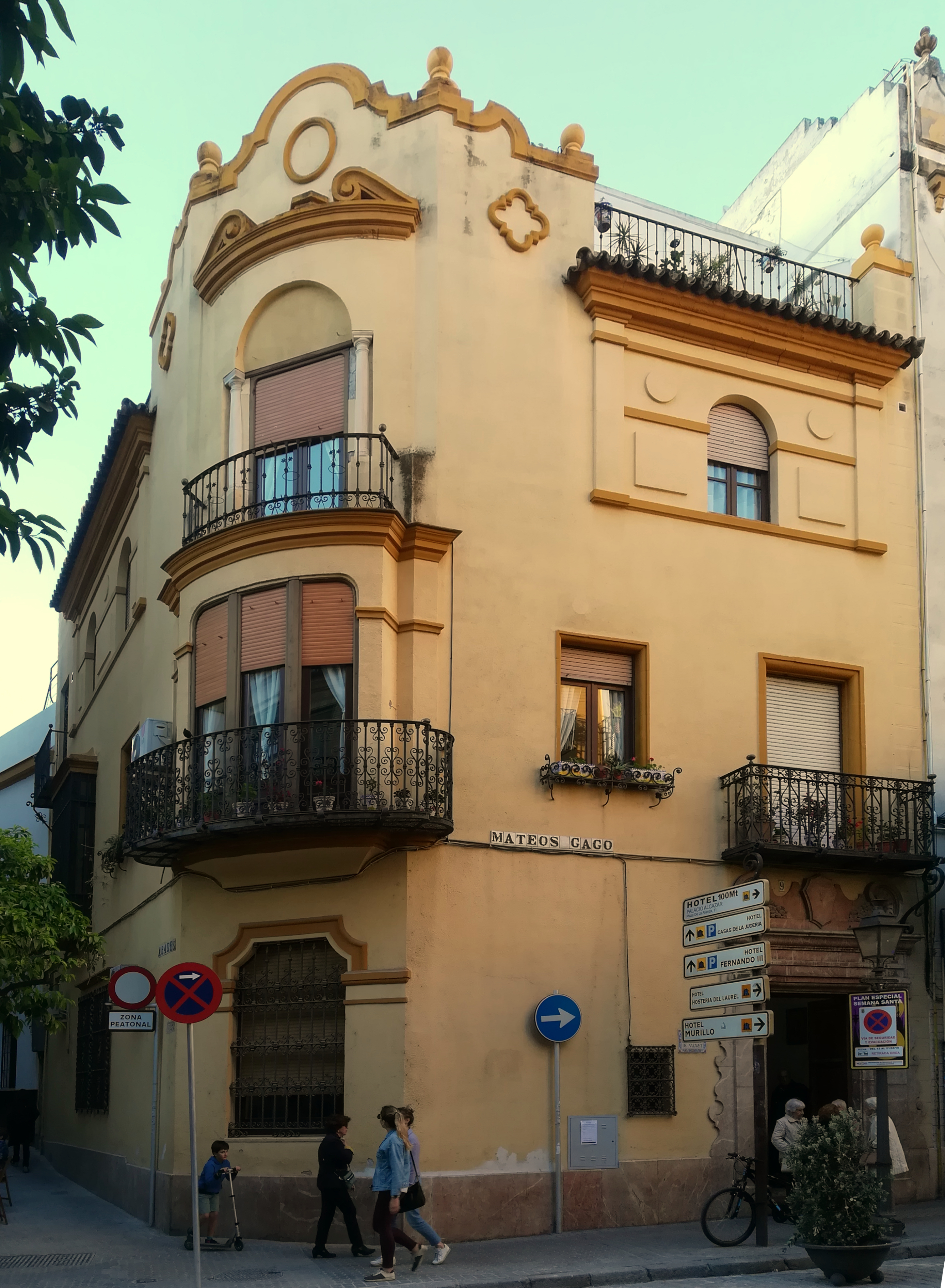 Casa de las Misioneras Eucarísticas de Nazaret. Sevilla, Andalucía, España.